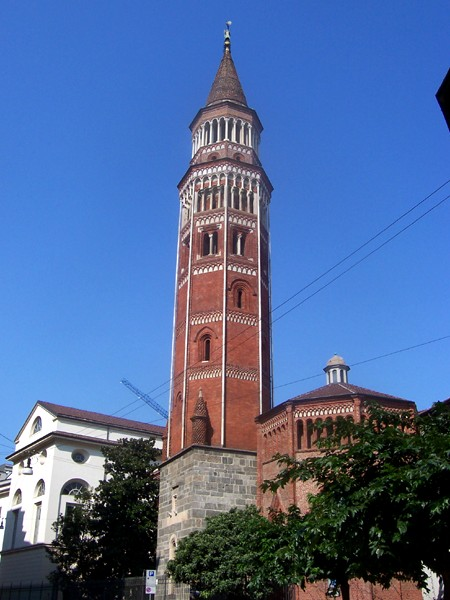 Campanile della Chiesa di San Gottardo in Corte a Milano